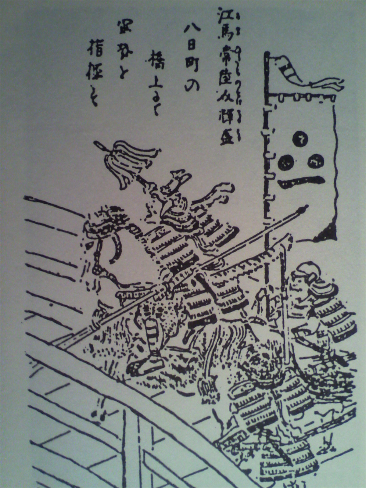 八日町の戦い 飛騨高山 飛騨国府